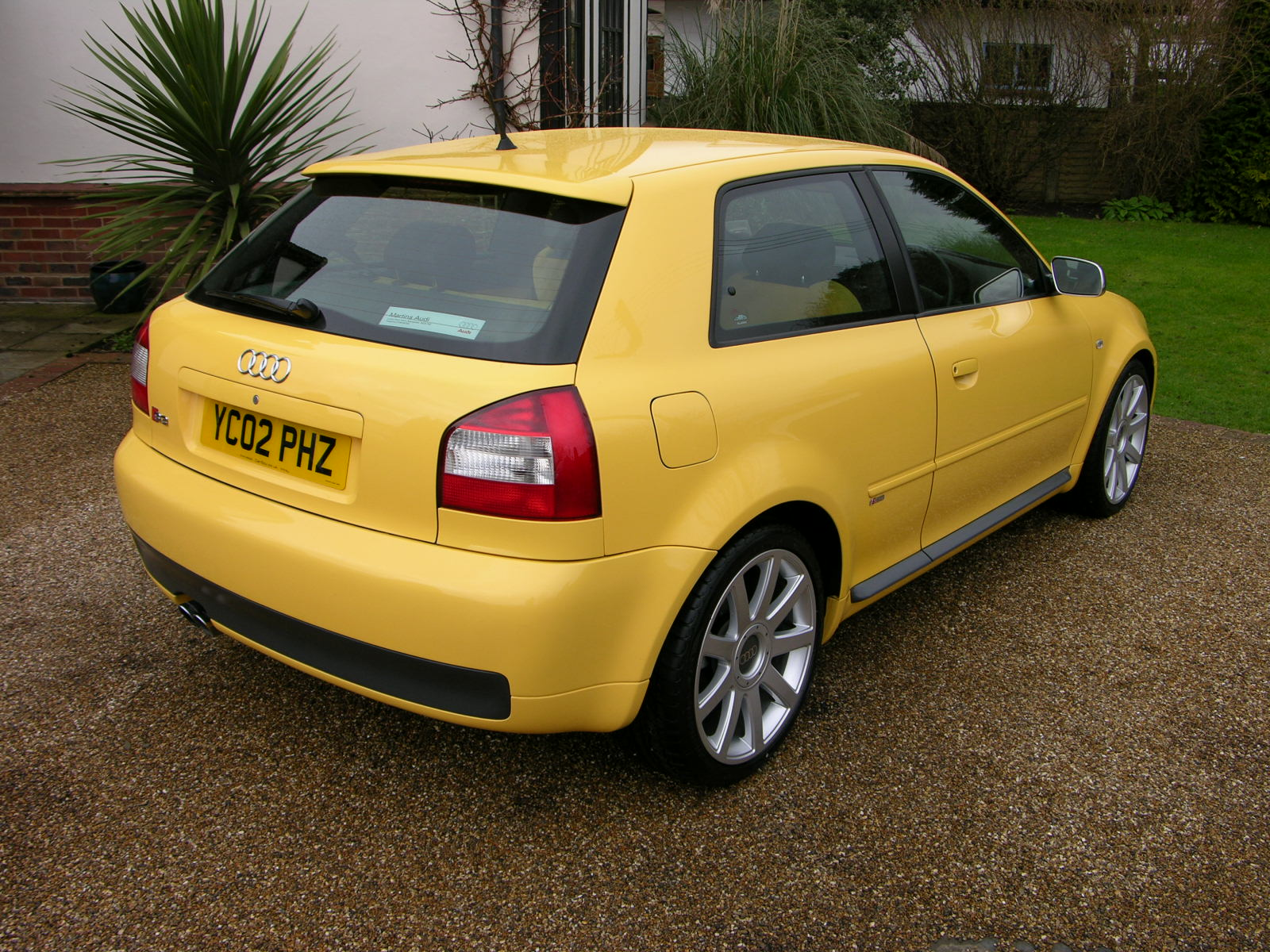 Audi S3 2002 Imola Yellow